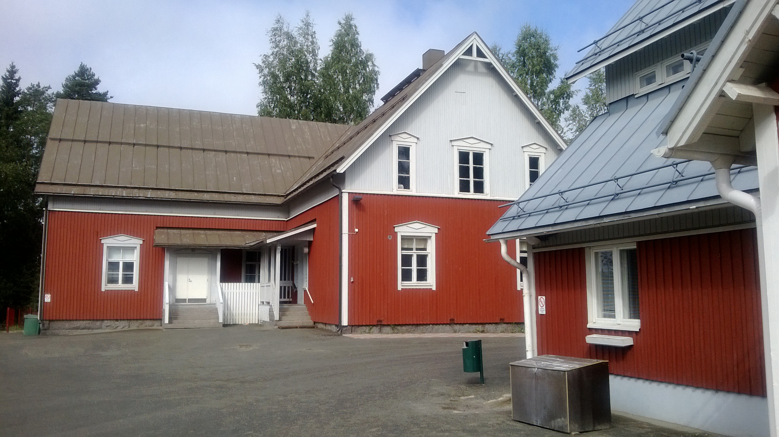 Kuohun koulu, Jyväskylä